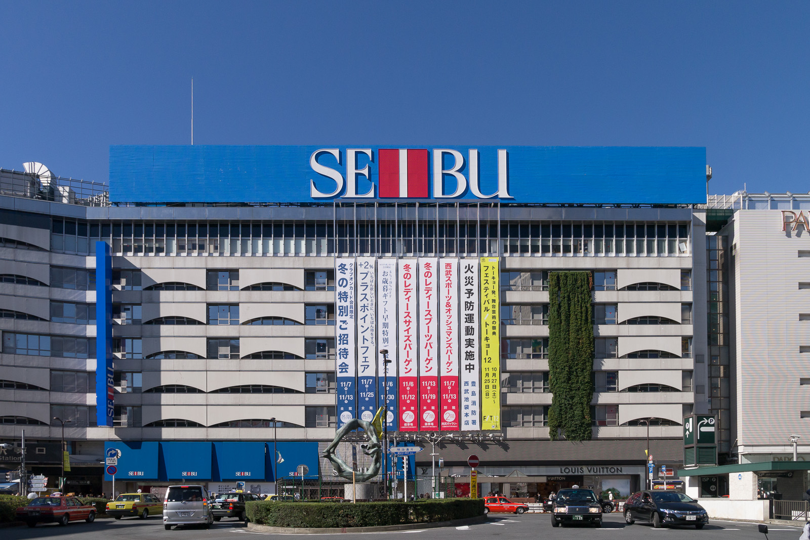 西武百貨店池袋店、池袋駅。東京都豊島区池袋。